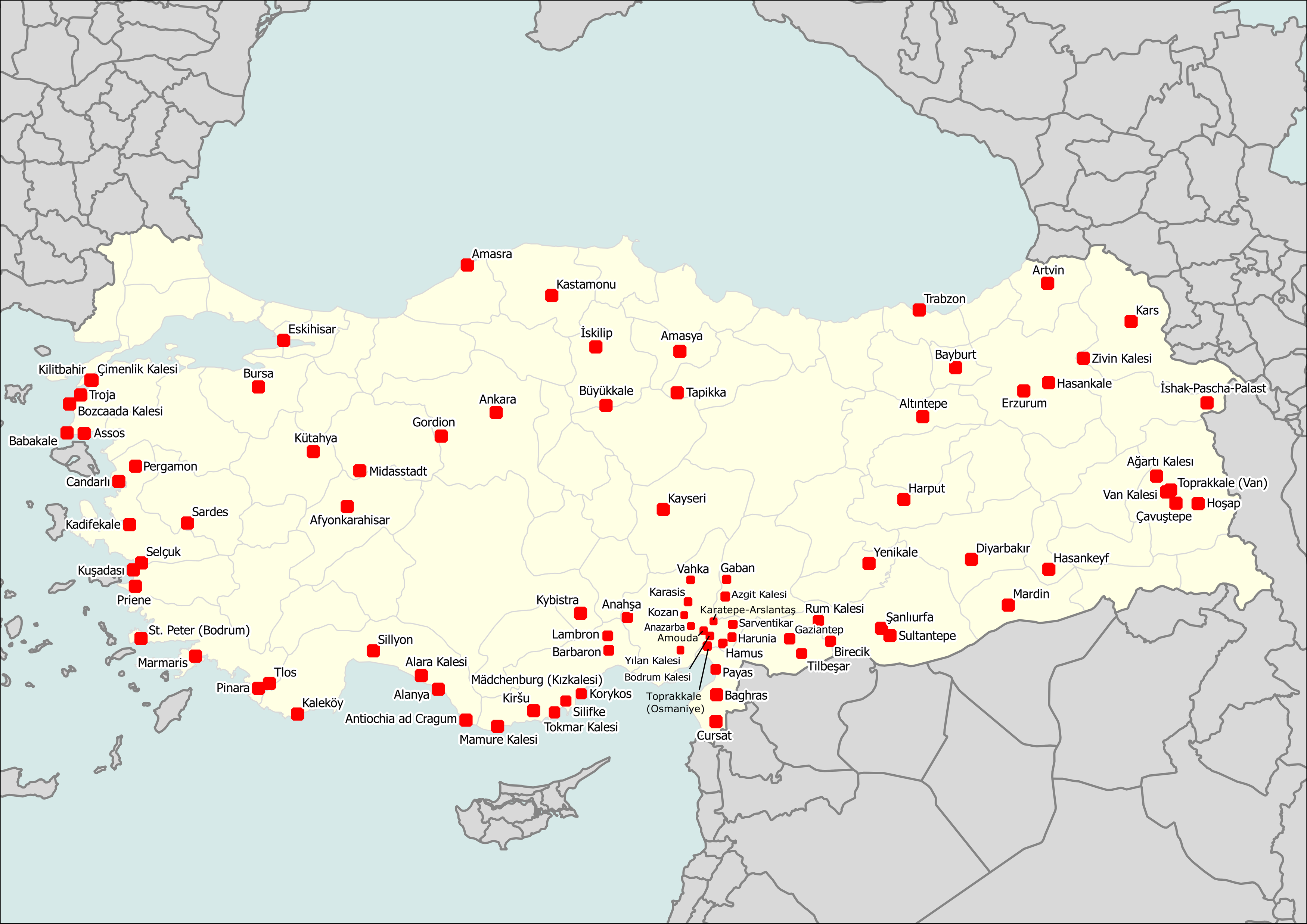 Karte der Burgen, Schlösser und Festungen in der Türkei